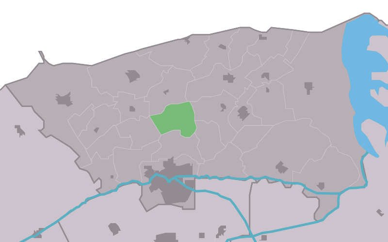 Kaartsje fan himrik fan Hantumerútbuorren